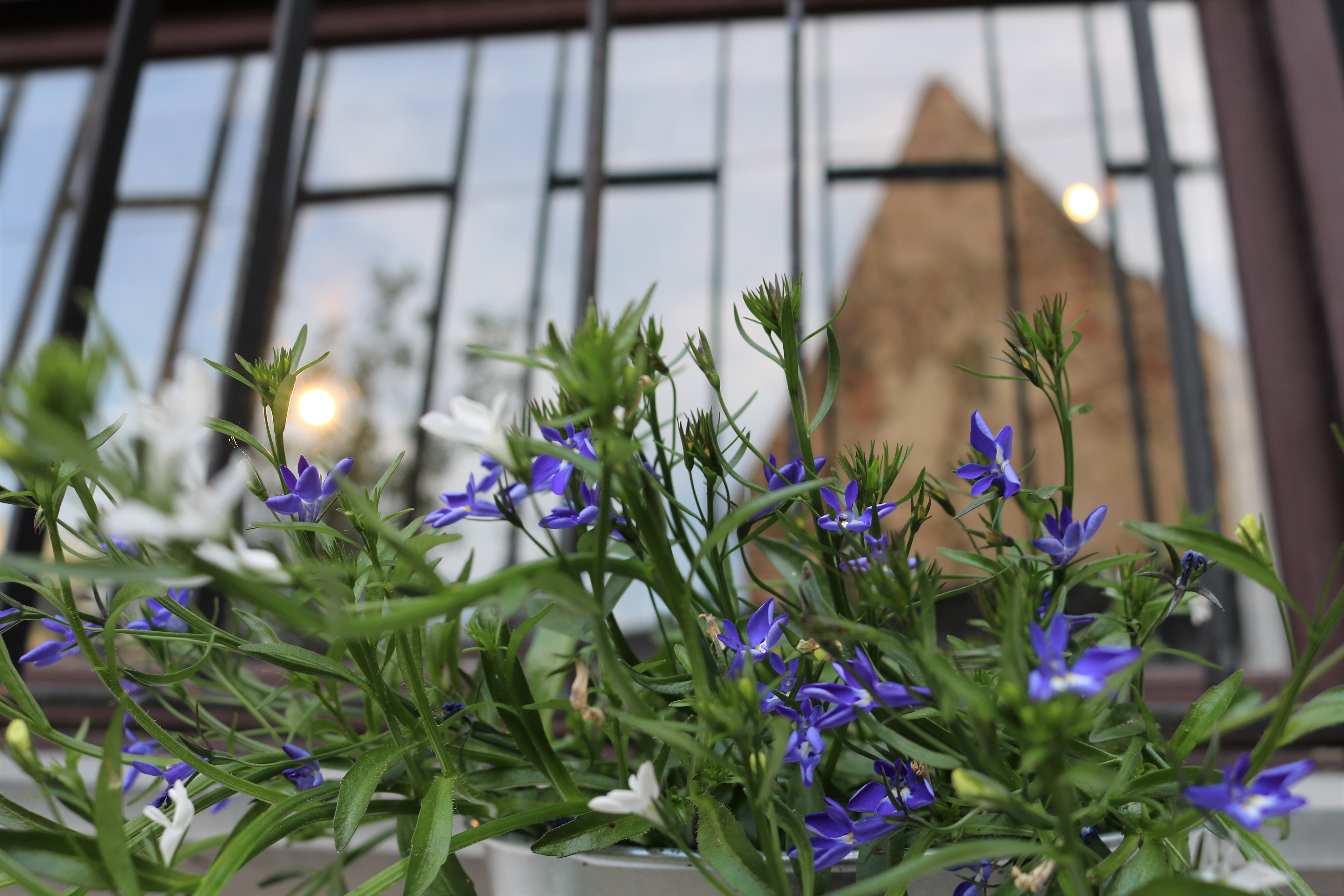 Kino muzeja pagalms